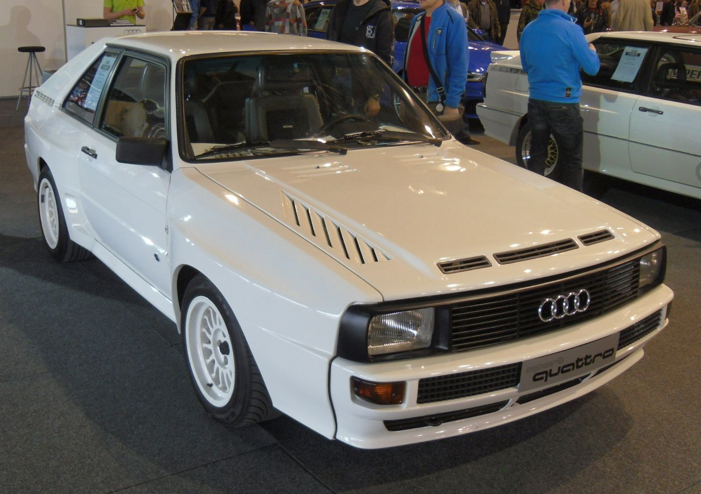 Alkuperäiskuntoinen Audi Sport quattro urheiluauto